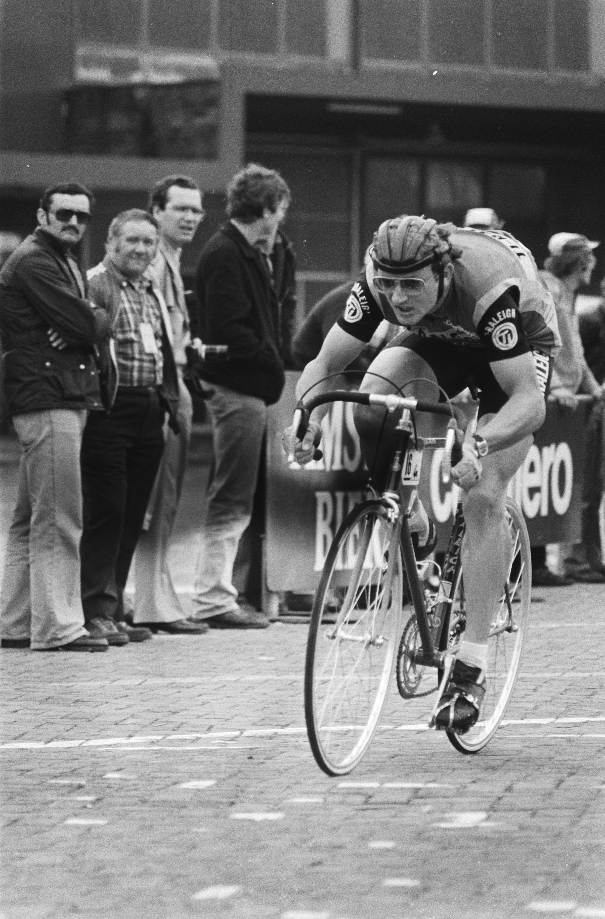 Collectie / Archief : Fotocollectie Anefo Reportage / Serie : [ onbekend ] Beschrijving : Tour de France 1978, proloog in Leiden; Jan Raas in actie Datum : 29 juni 1978 Locatie : Leiden, Zuid-Holland Trefwoorden : wielrennen Instellingsnaam : Tour de France Fotograaf : Peters, Hans / Anefo Auteursrechthebbende : Nationaal Archief Materiaalsoort : Negatief (zwart/wit) Nummer archiefinventaris : bekijk toegang 2.24.01.05 Bestanddeelnummer : 929-7996